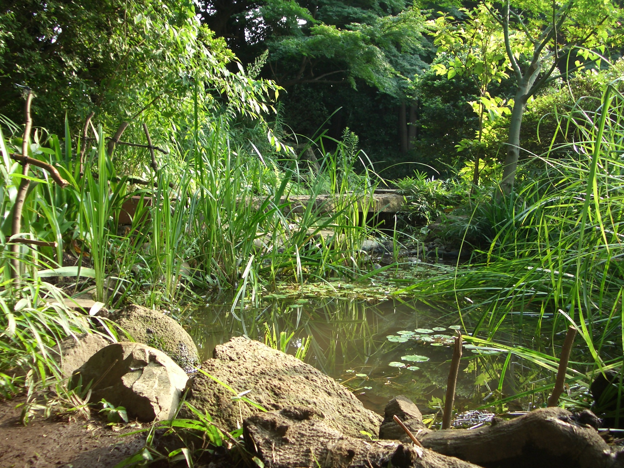 Pond in Sakuragaoka Sumireba Nature Garden (桜丘すみれば自然庭園)